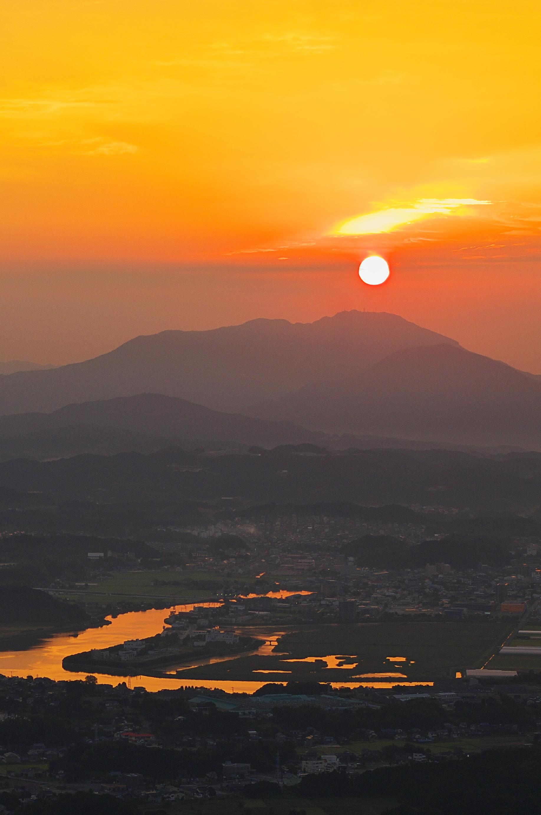 竹の古場公園からの日の出